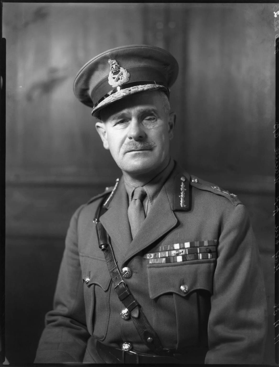 Lord Wavell